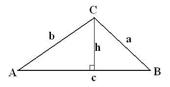 Bevis for sinusrelationerne